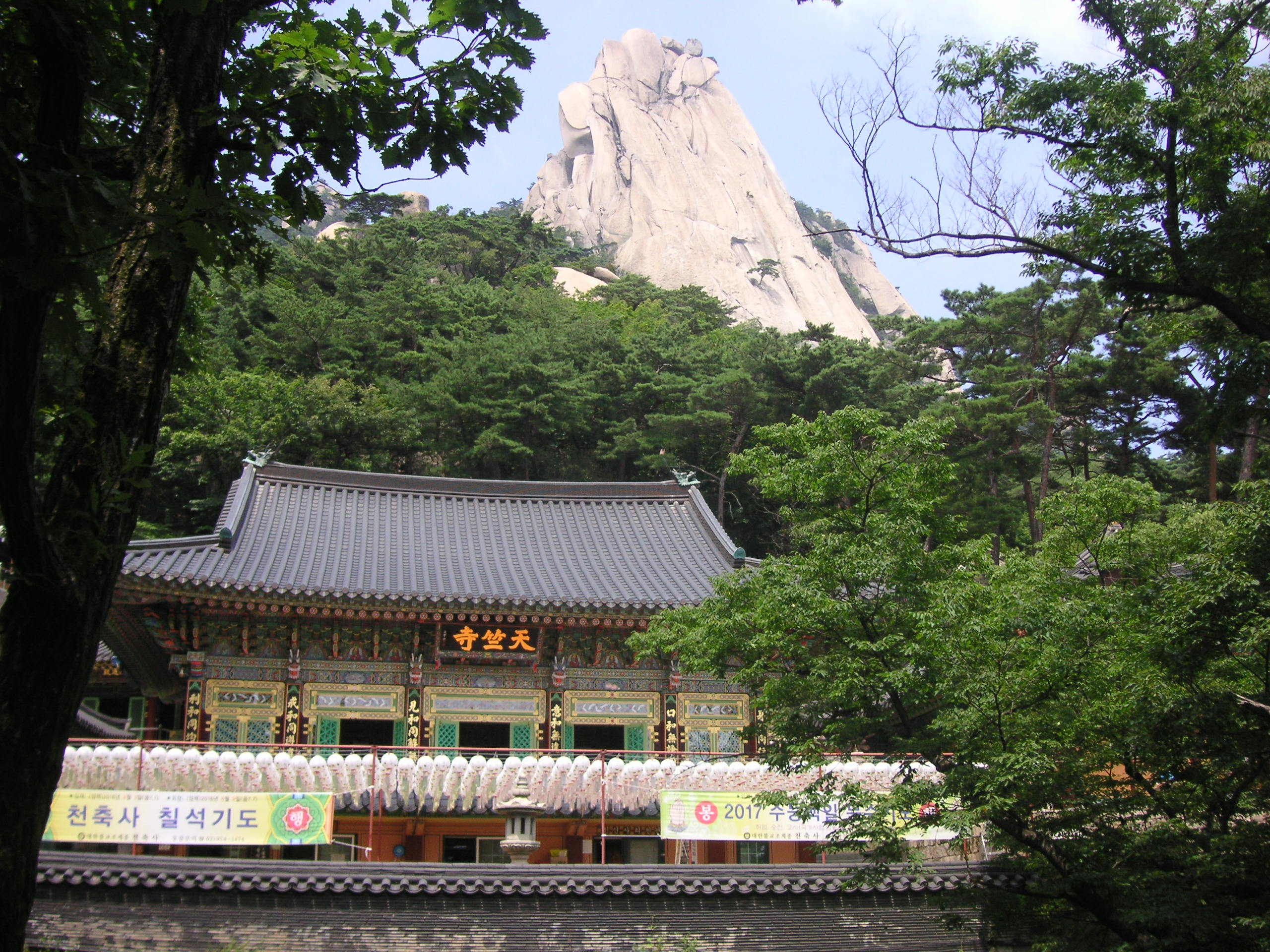 Cheonchuksa Tempel unterhalb des Dobongsan, Seoul, Korea